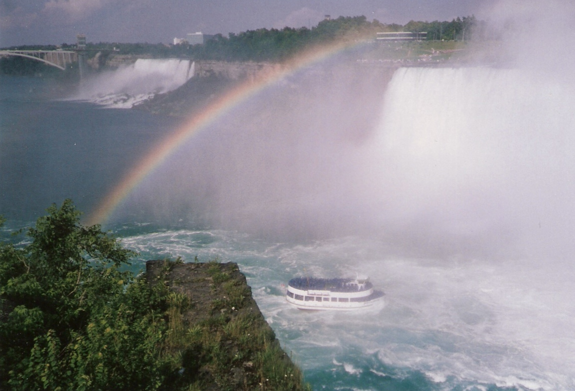 niagara falls, U.S.A